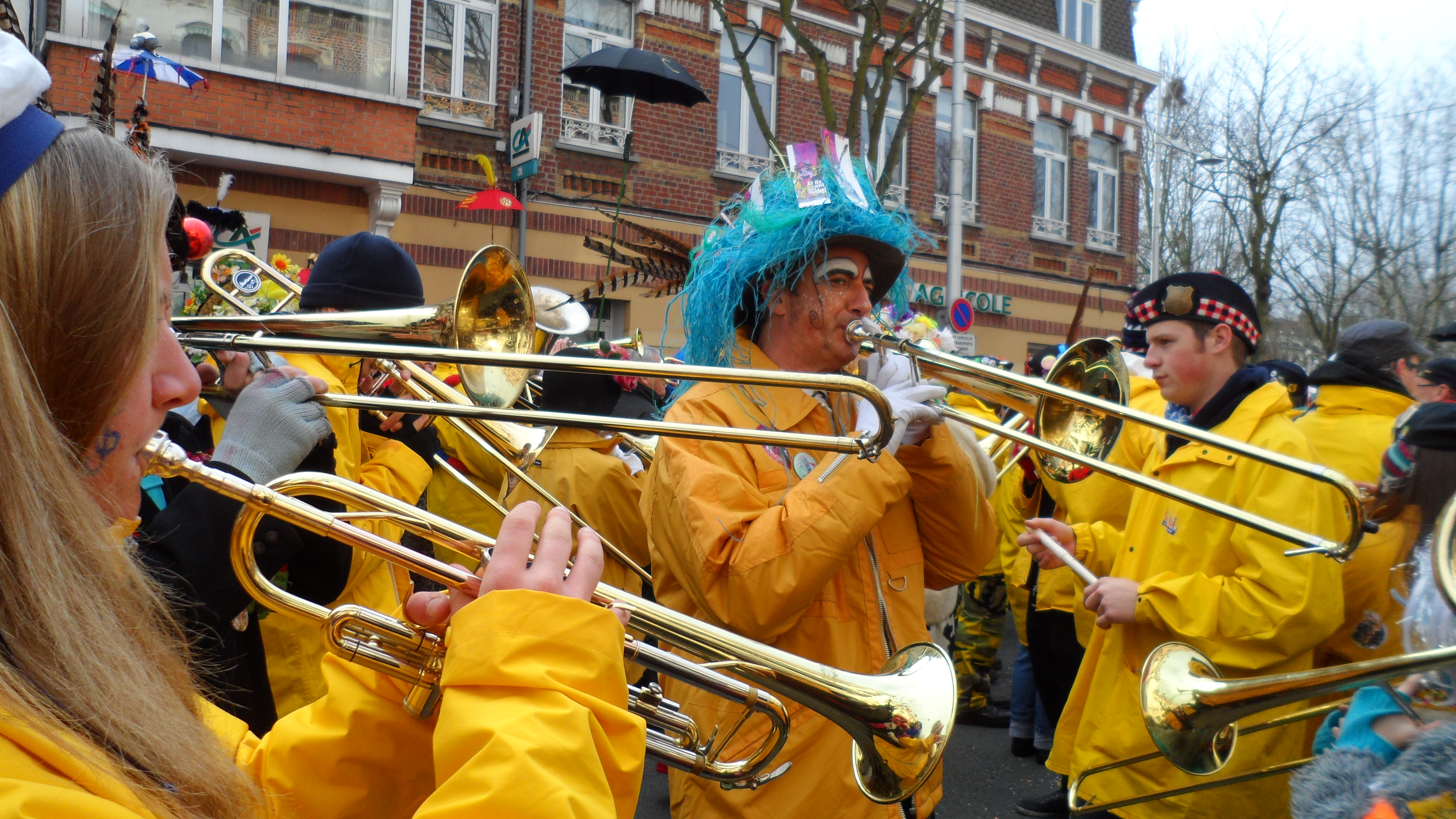 Trompettiste et tromboniste de la "clique" (la fanfare) du carnaval de Dunkerque lors de l'avant bande de Malo-les-Bains